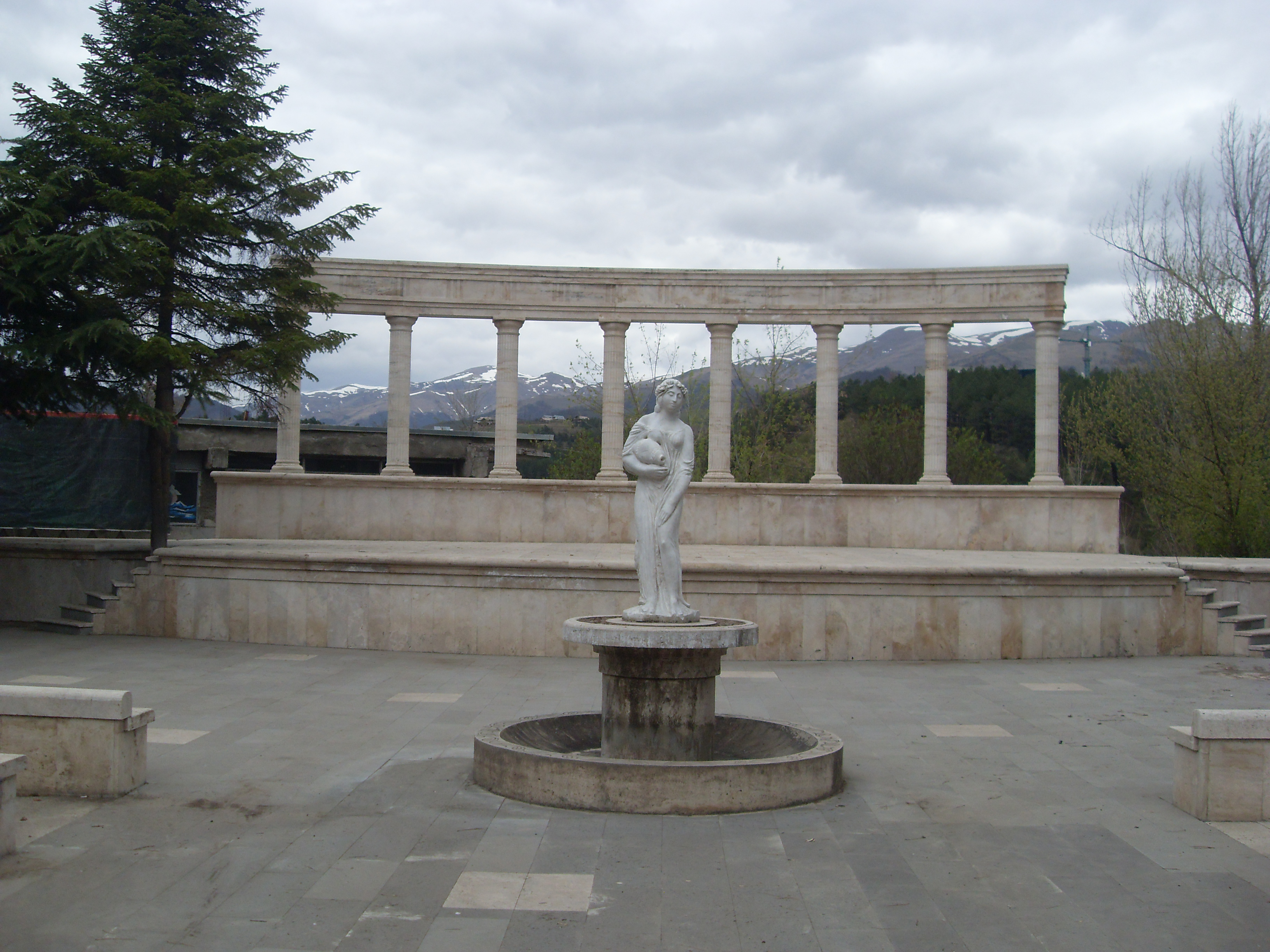 Մայիսյան ապստամբության մասնակիցներին նվիրված հուշարձան, 1982 թ., հեղ.՝ Ս. Ավետիսյան, Ա. Փարսյան 3/126